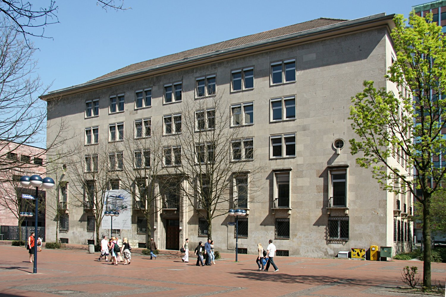 Das Dortberghaus